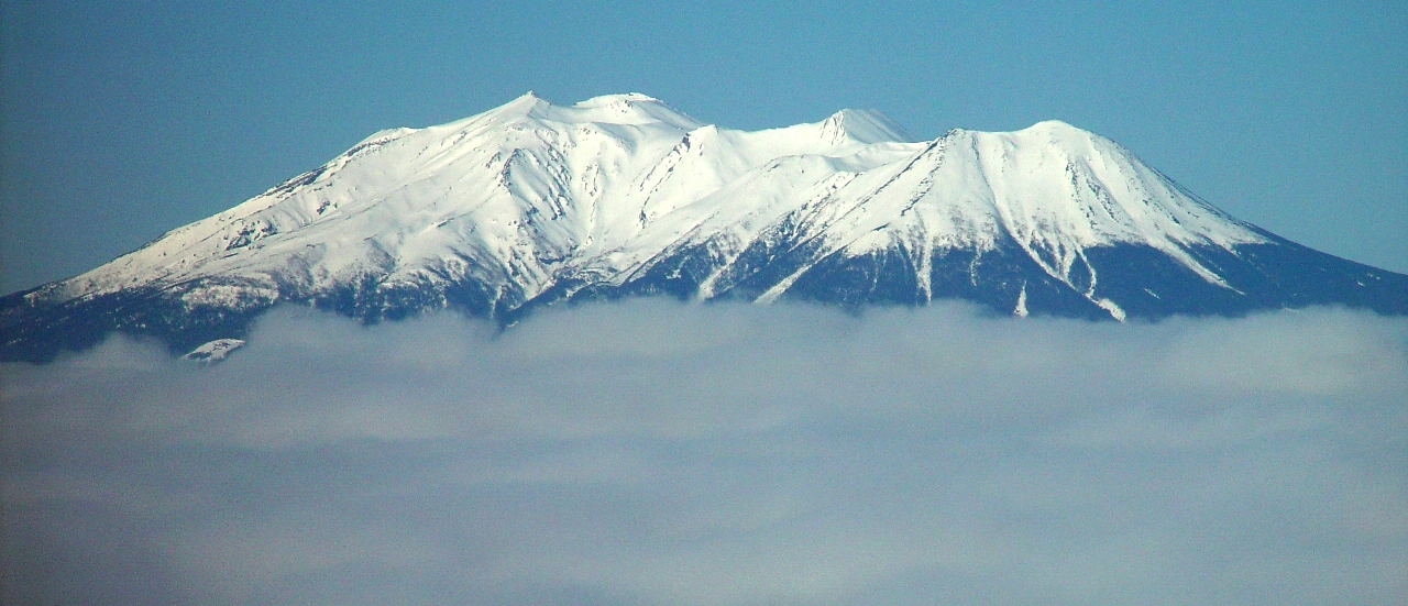 信州松本野麦峠スキー場から望む雲海の浮かぶ御嶽山